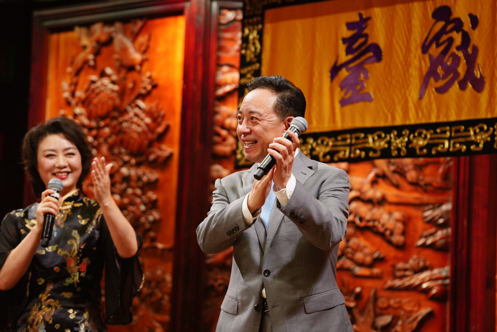 俩人同步动作可真是甜死了，连笑容都是同款的hhh P4 某人一直盯